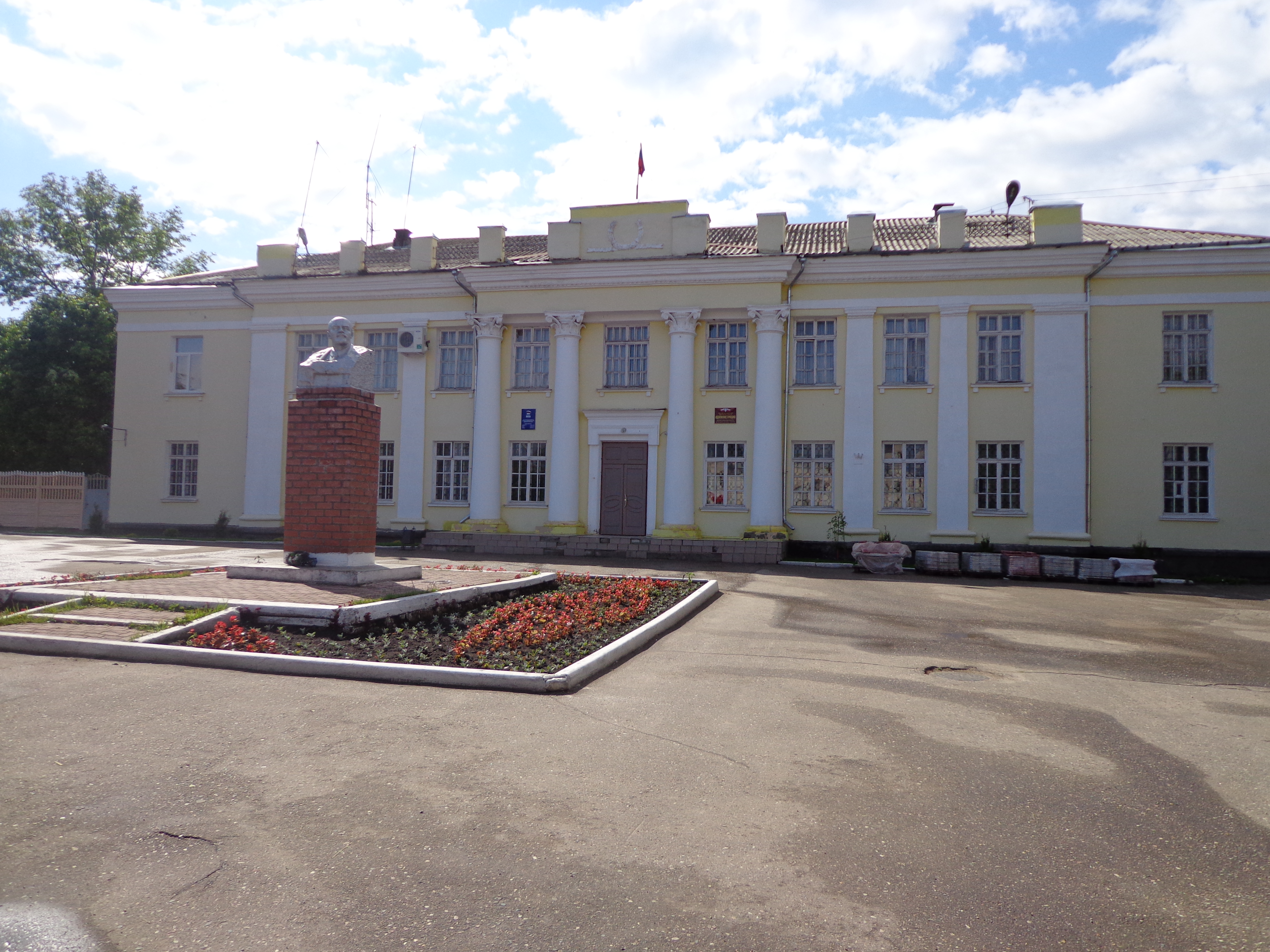 Мэрия города Комсомольска Ивановской области